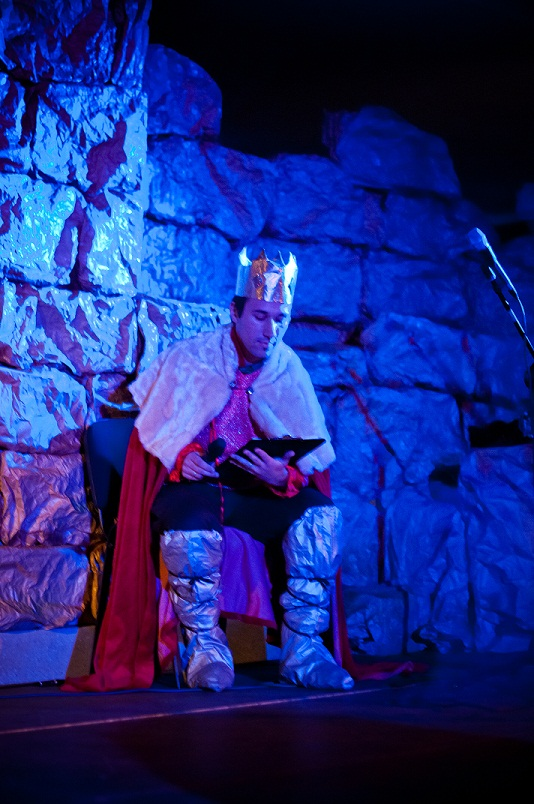 Prowadzący koncert galowy Festiwalu HiT 2010 dh. Damian Dec